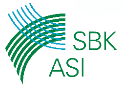 Logo des Schweizer Berufsverbands der Pflegefachpersonen SBK